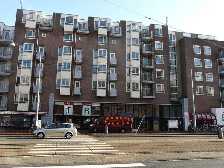 Gebouw De Citadel van De Halve Wereld is gebouwd in 1985 bovenop de metrobuis, waardoor het de duurste fundering ter wereld kreeg